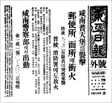 보천보 전투에 관한 동아일보 호외 기사